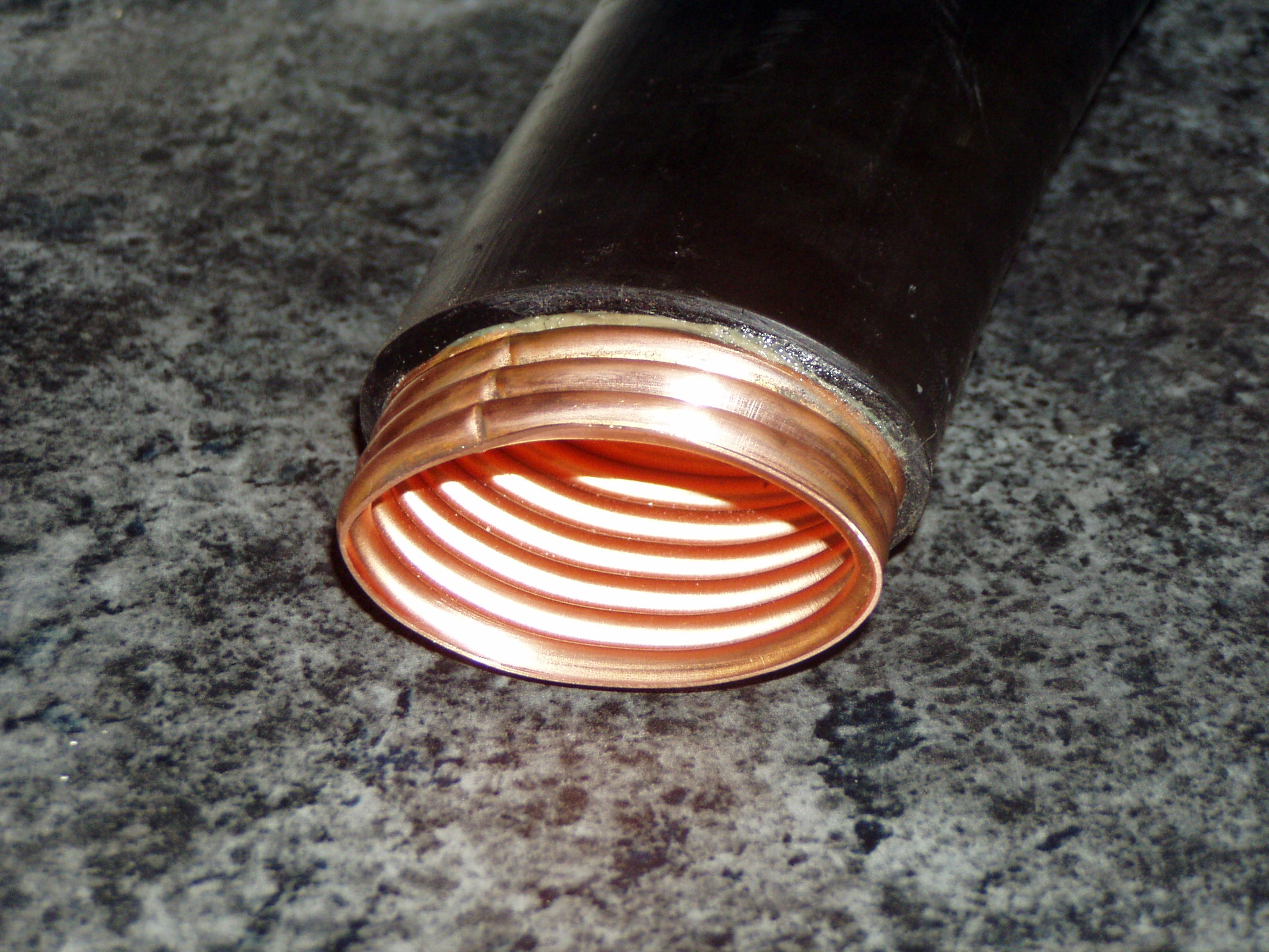 elliptischer Hohlleiter für den Frequenzbereich von 3,8 bis 5,8 GHz. Zwischen dem gewellten Kupferrohr und dem schwarzen Mantel befindet sich eine klebrige Schicht, welche die Rillen des Kupferrohrs ausfüllt und somit eine bessere Biegsamkeit bewirkt. An der Luft härtet diese klebrige Schicht aus und bewirkt so einen gewissen Selbstheilungseffekt bei kleineren Defekten.